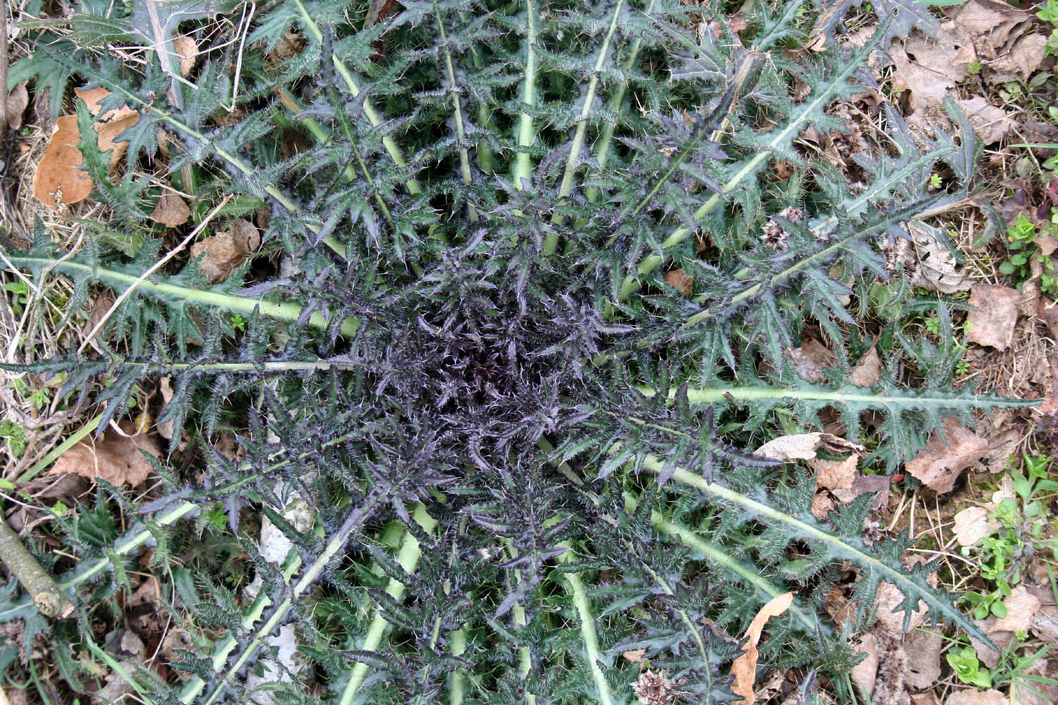 Růžice listů pupavy bezlodyžné.